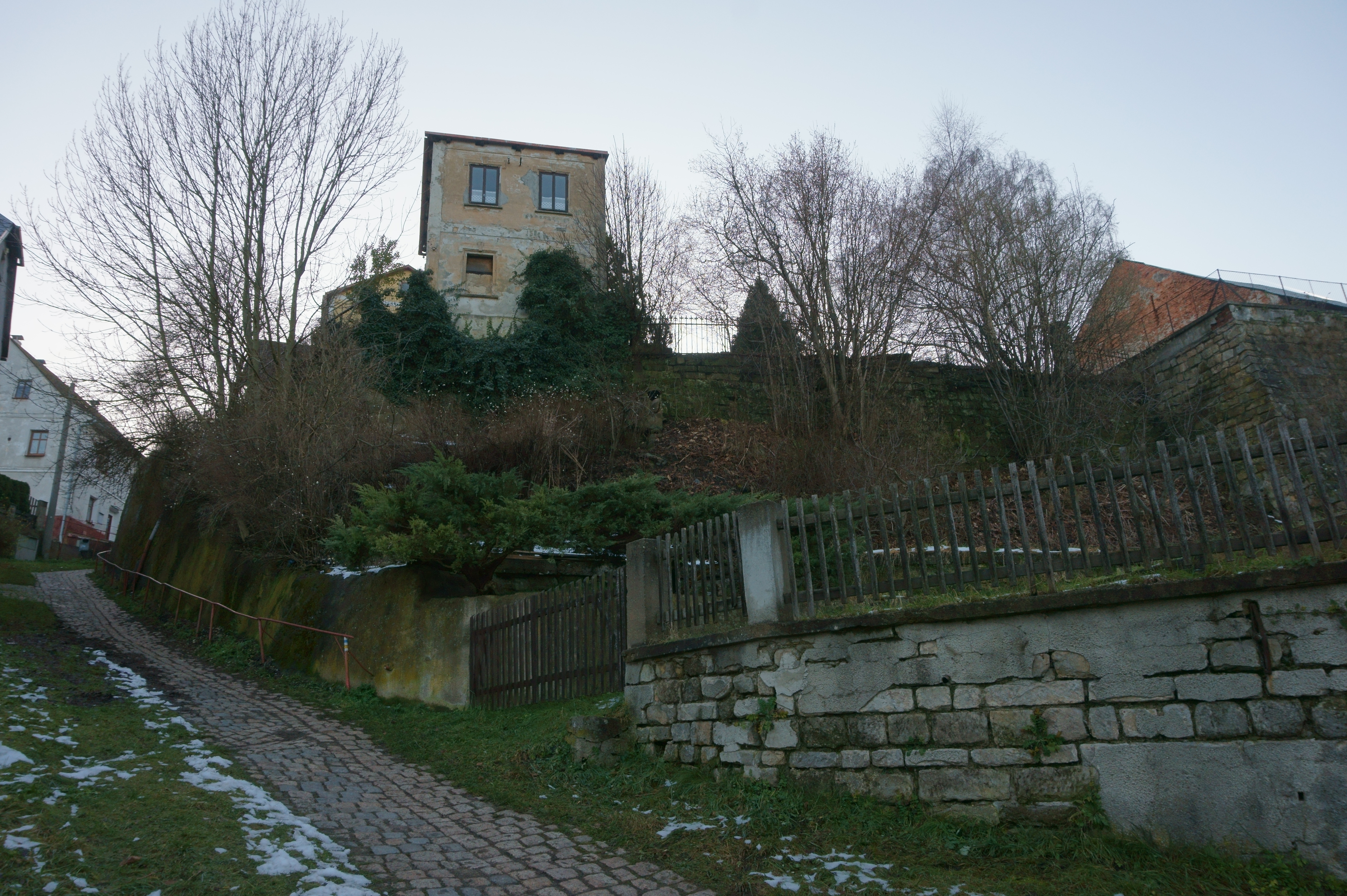 Hodkovice nad Mohelkou - terasy, K. H. Borovského